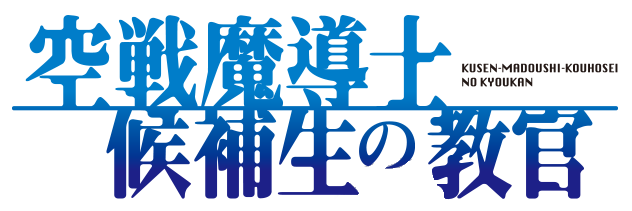 Logo dell'anime Kūsen madōshi kōhosei no kyōkan